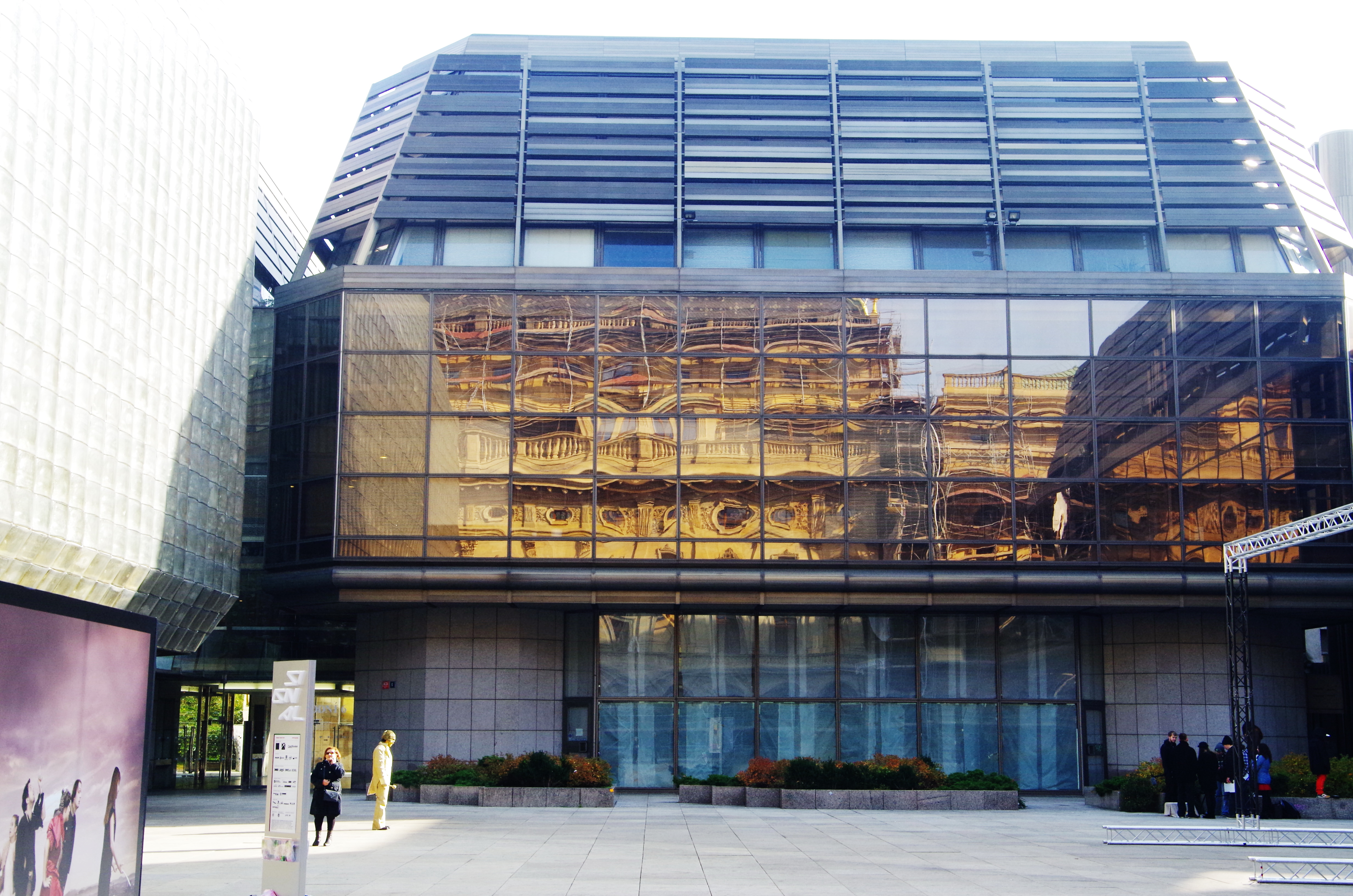 Prag, Narodni divadlo, nova scena